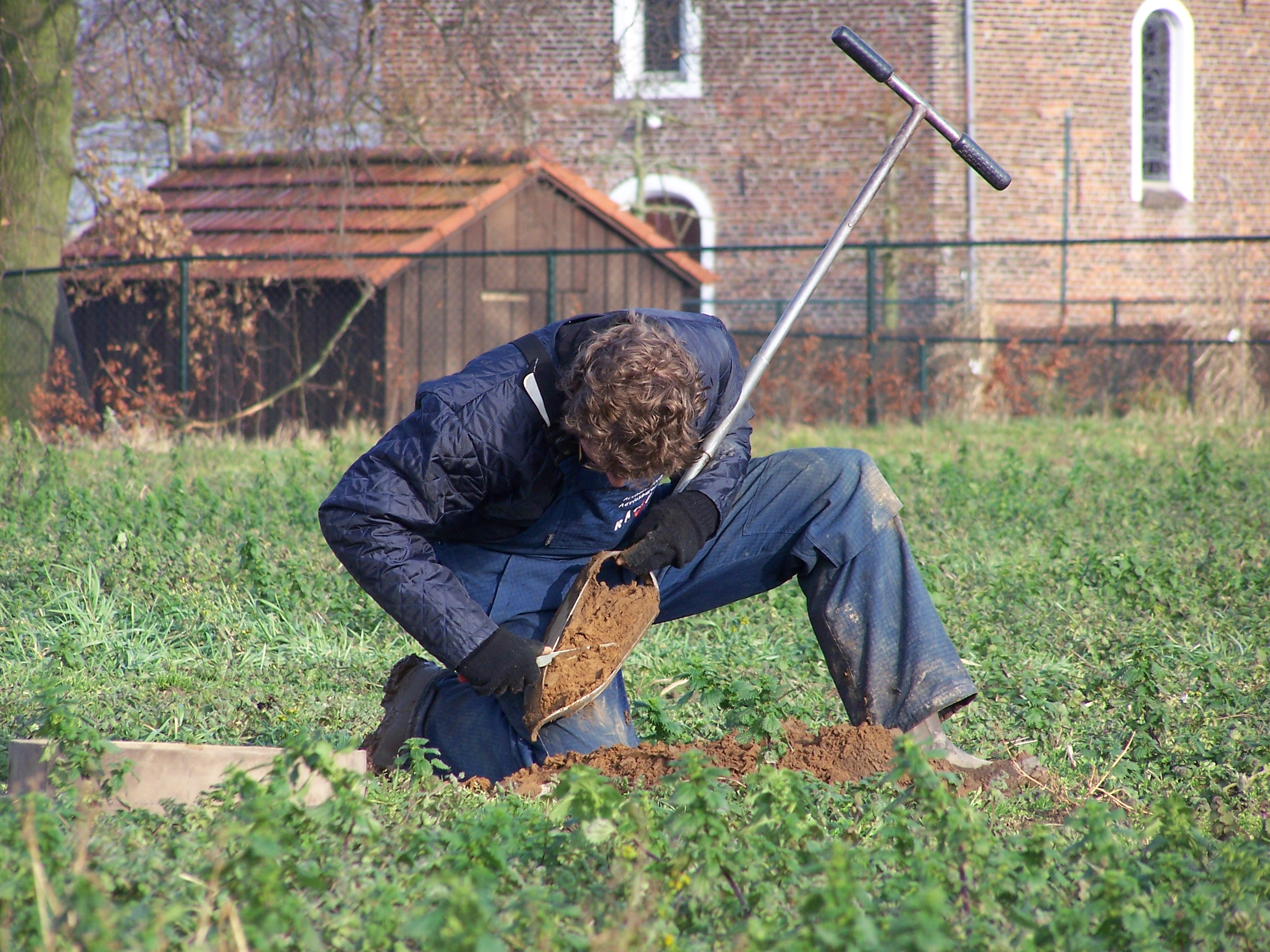 Prospectief booronderzoek door RAAP Archeologisch Adviesbureau.